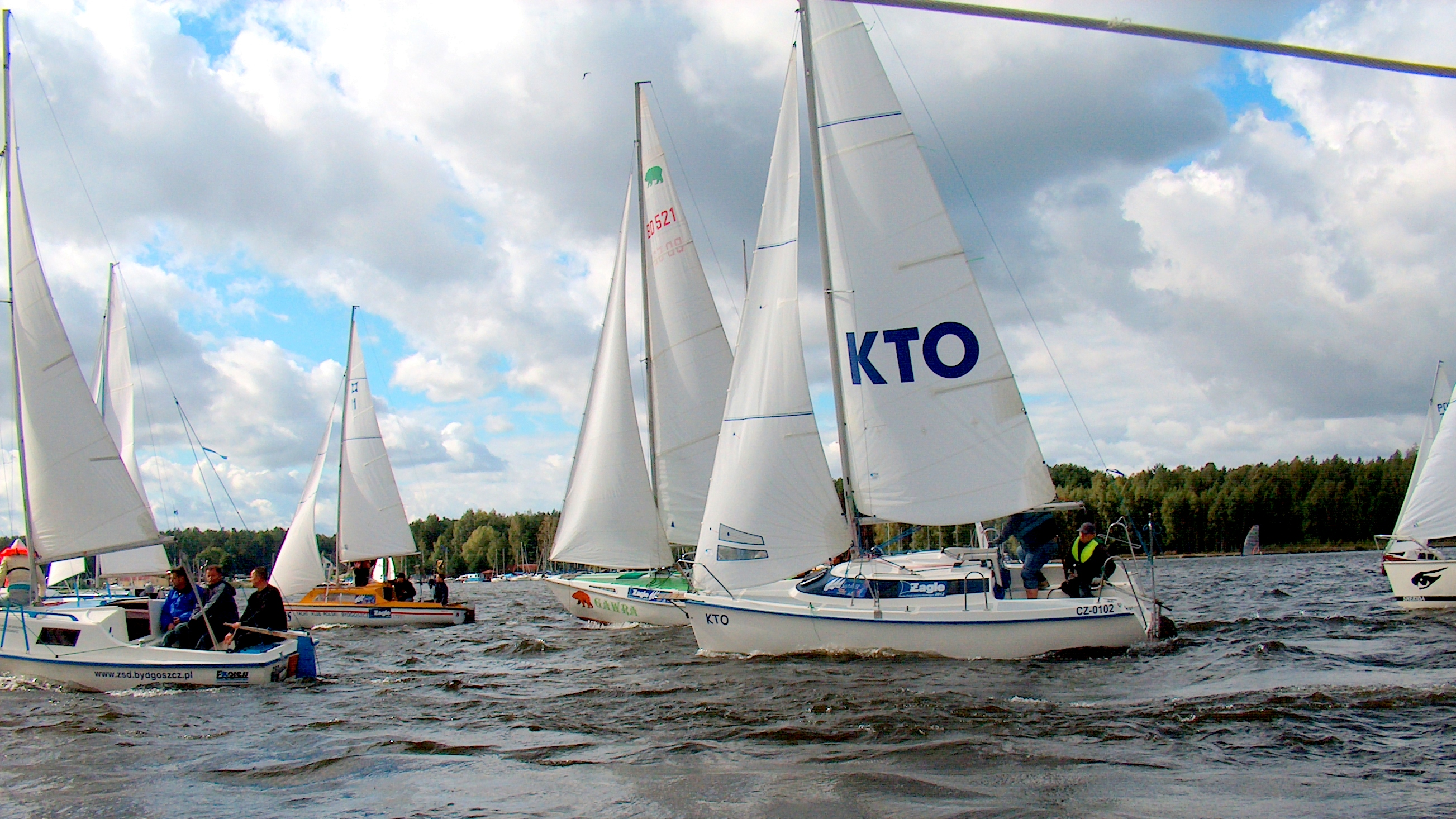 2012. 09. 15 Zalew Koronowo - Pieczyska . Regaty na zakończenie sezonu żeglarskiego